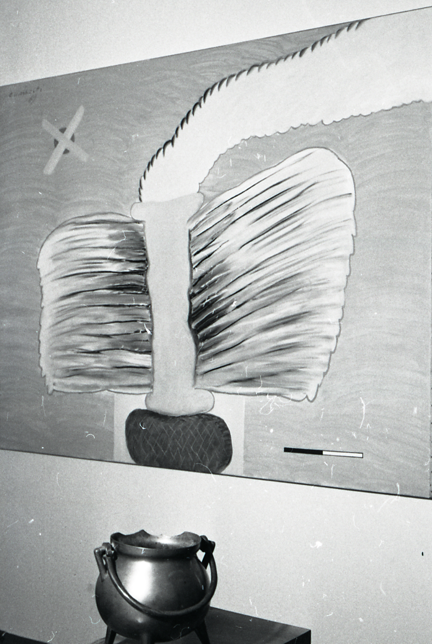 Servizio fotografico : Bologna, 1970 / Paolo Monti. - Strisce: 1, Fotogrammi complessivi: 3 : Negativo b/n, gelatina bromuro d'argento/ pellicola ; 35 mm. - ((I fotogrammi hanno una doppia numerazione. . - Sul portanegativi: Nikon tri-X fr. - Nell'agenda di lavoro citata in nota Monti specifica che le foto sono state scattate presso lo studio dell'artista, sito in Via Saragozza n°83 a Bologna, per il catalogo della mostra. - Occasione: Documentazione di alcune opere dell'artista Pirro Cuniberti per il catalogo di una mostra tenutasi presso la Galleria Foscherari. - Fonte: Fattura di Paolo Monti: IV. Commesse/ Fattura (1970/03/13), presso Archivio Paolo Monti. - Fonte: Agenda di Paolo Monti: Monti/ 3 aprile 1966 - 9 marzo 1971/ 12421-16823 (1966-1971), presso Archivio Paolo Monti